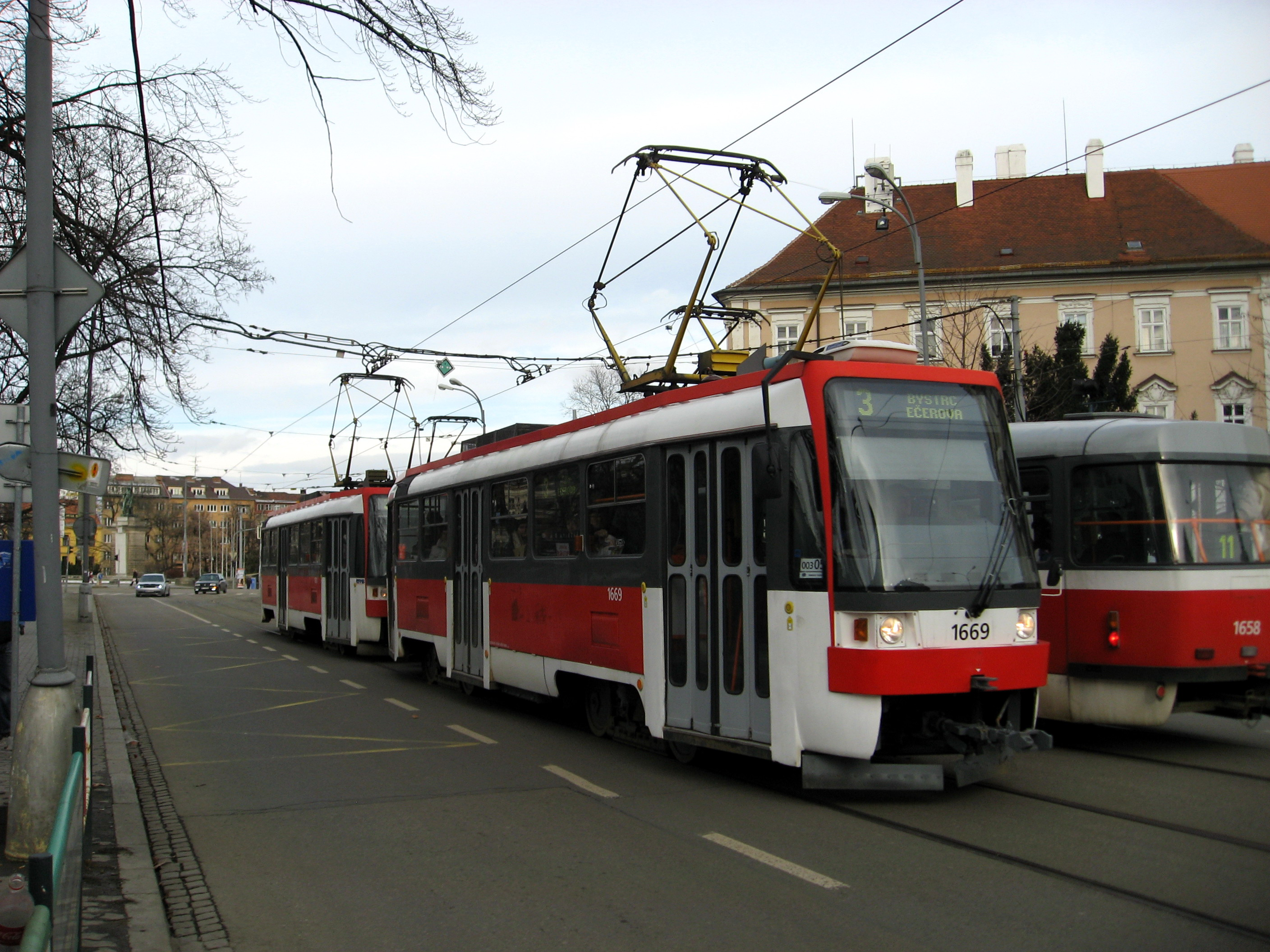 Tatra T3RF v Brně na lince č. 3